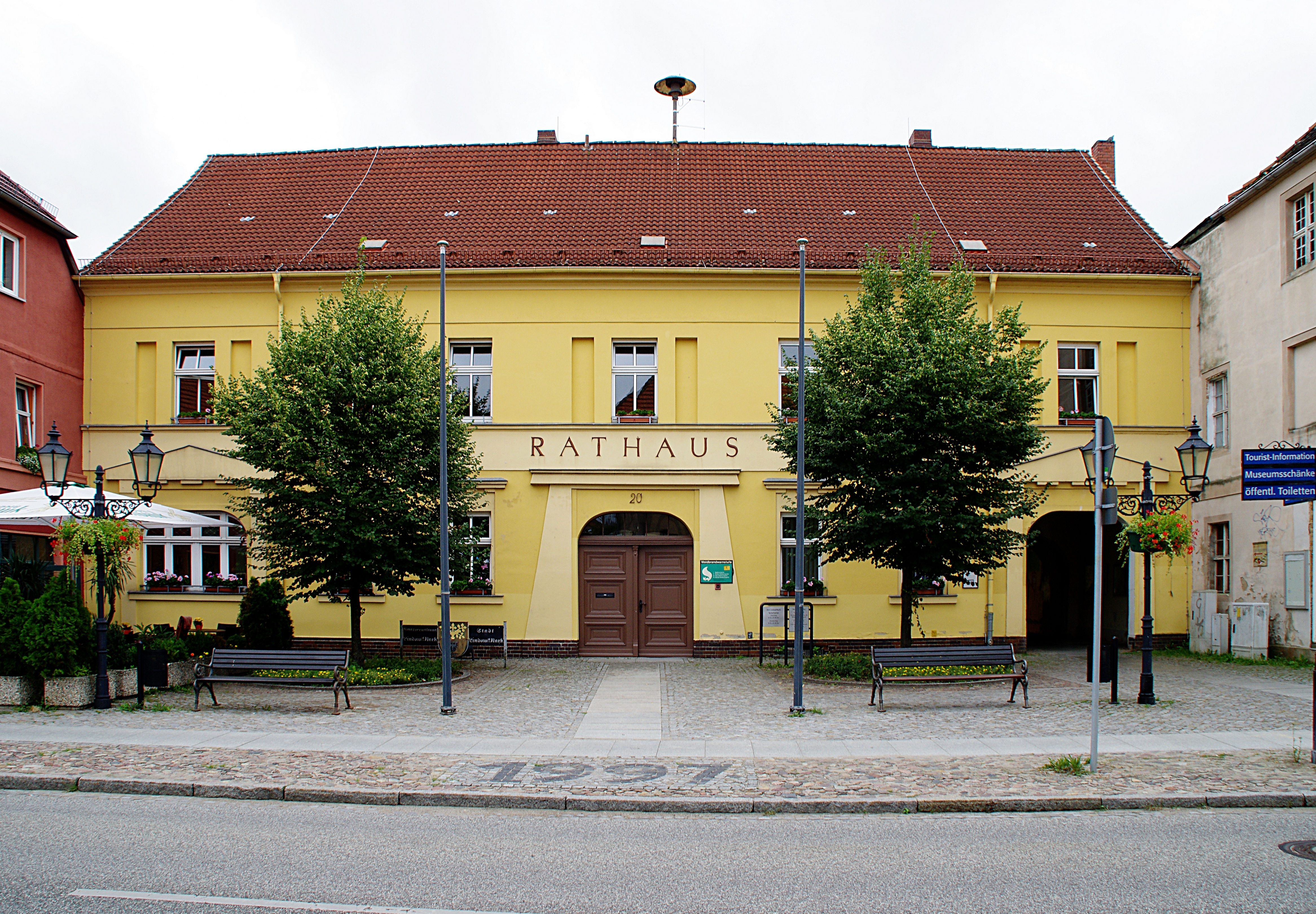 Lindow (Mark) in Brandenburg. Das Haus in der Straße des Friedens 20 steht unter Denkmalschutz.